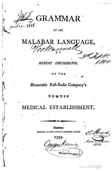 ഗ്രാമർ ഓഫ് ദ മലബാർ ലാംഗ്വേജ്